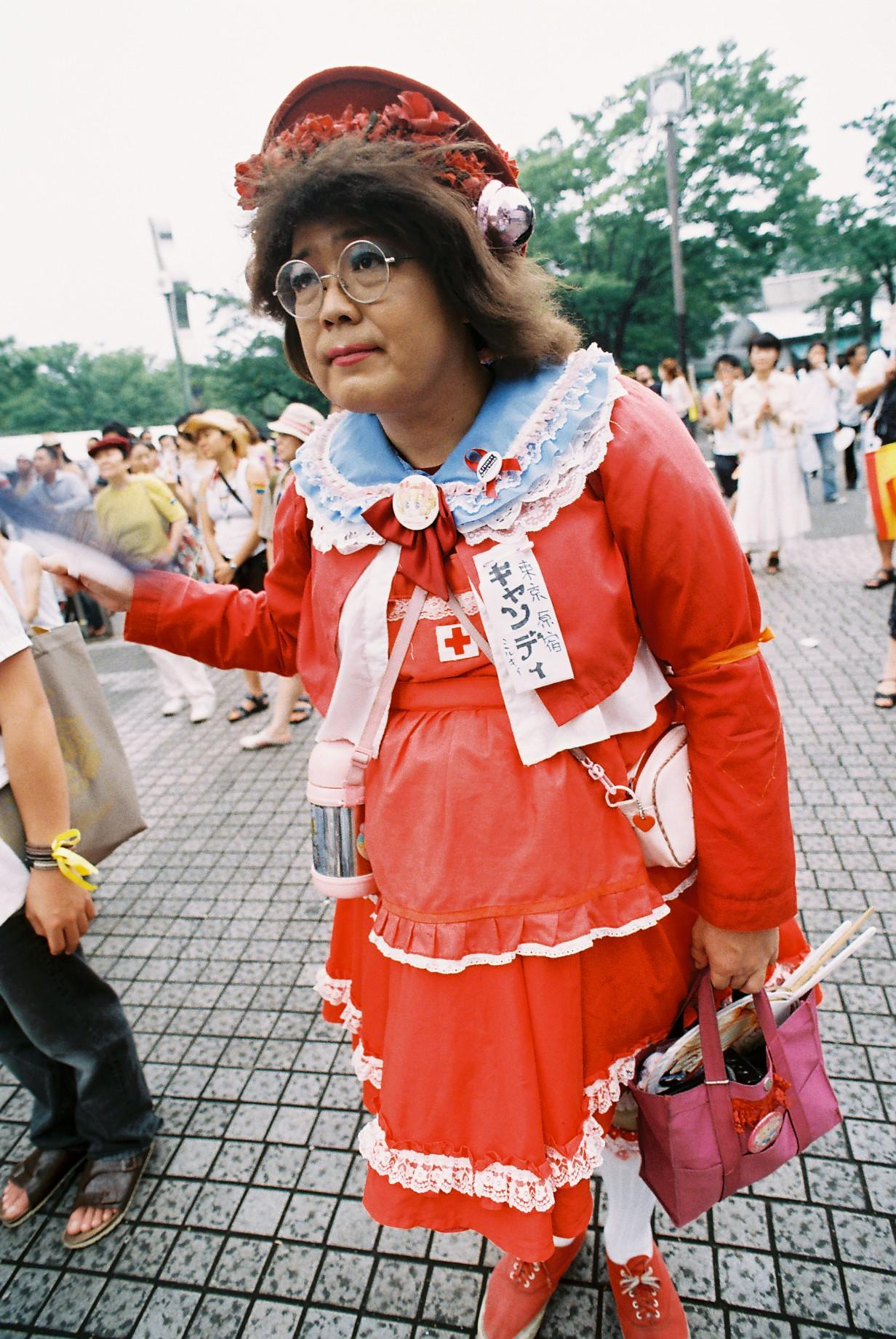 Candy Milk, célèbre travesti Tokyoïte, à la Gay Pride de Tôkyô, le 12 aôut 2006.